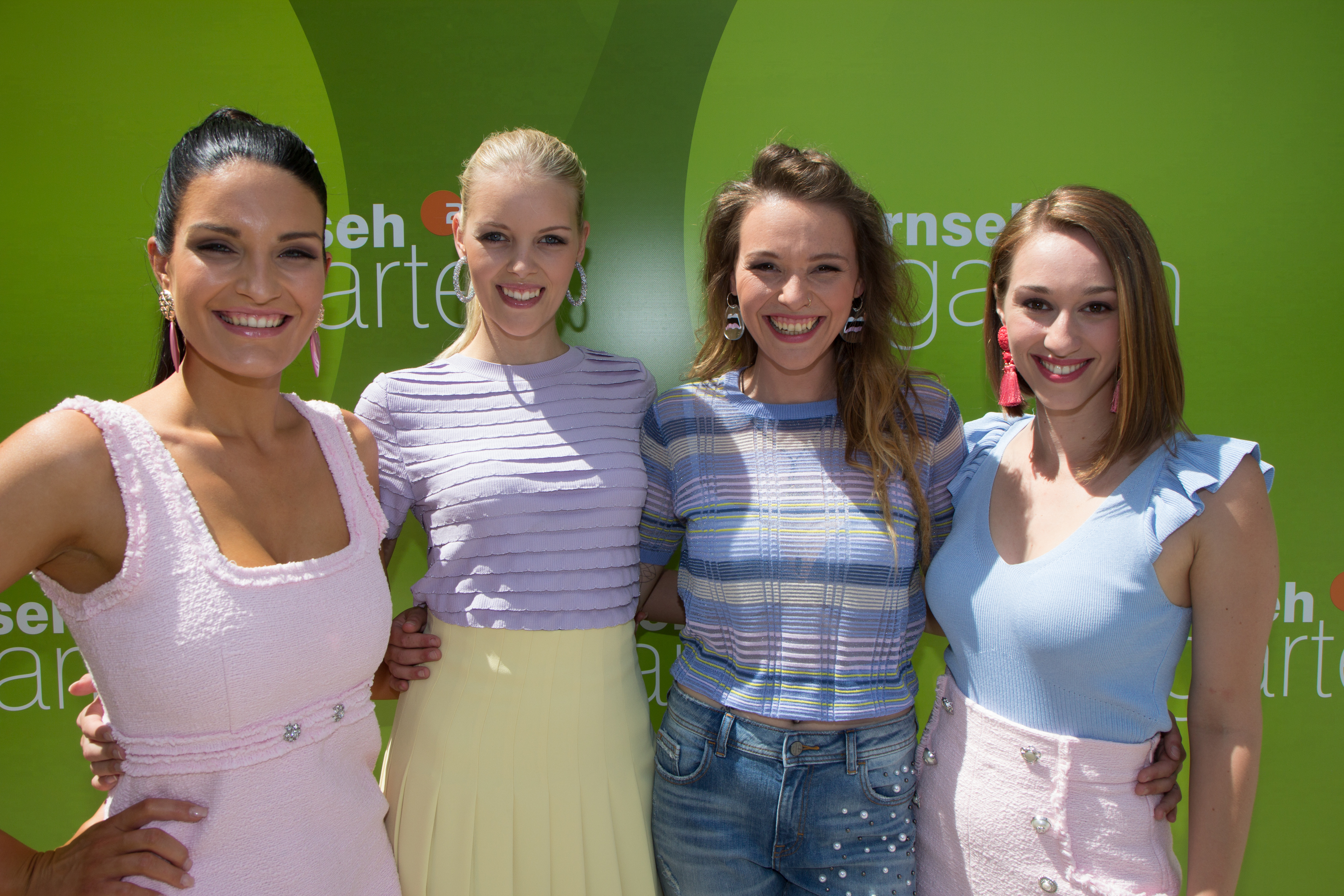 Lichtblick als Gast beim ZDF-Fernsehgarten am 27. Mai 2018 in Mainz.